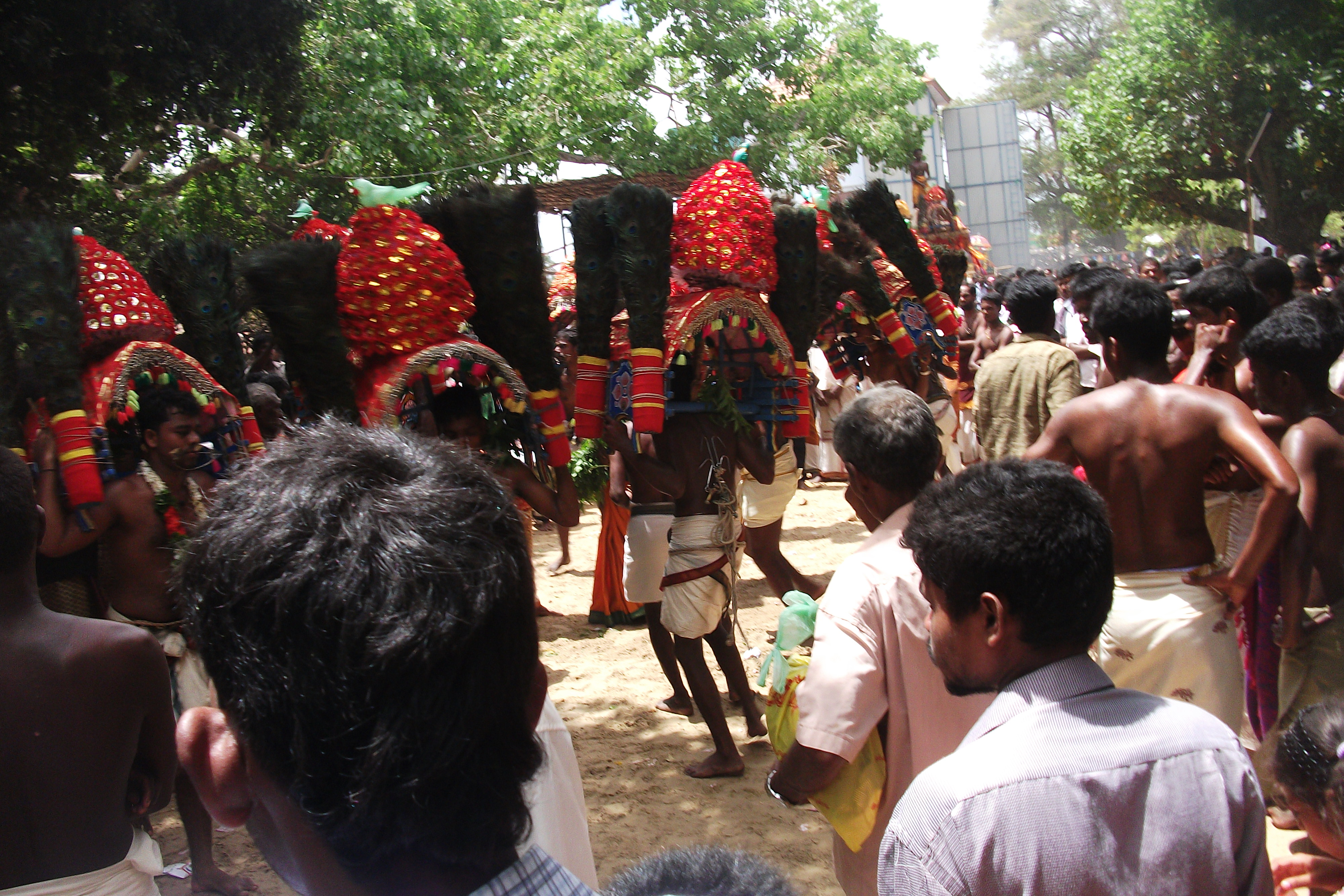 பக்தர்களின் நேர்த்திக்கடன்கள்